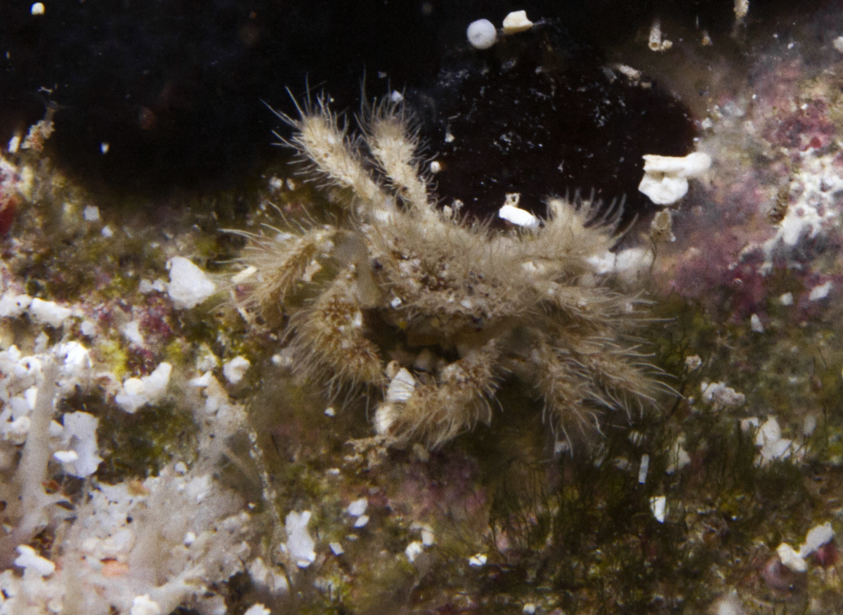 Un crabe Hirsutodynomene spinosa à la Réunion.